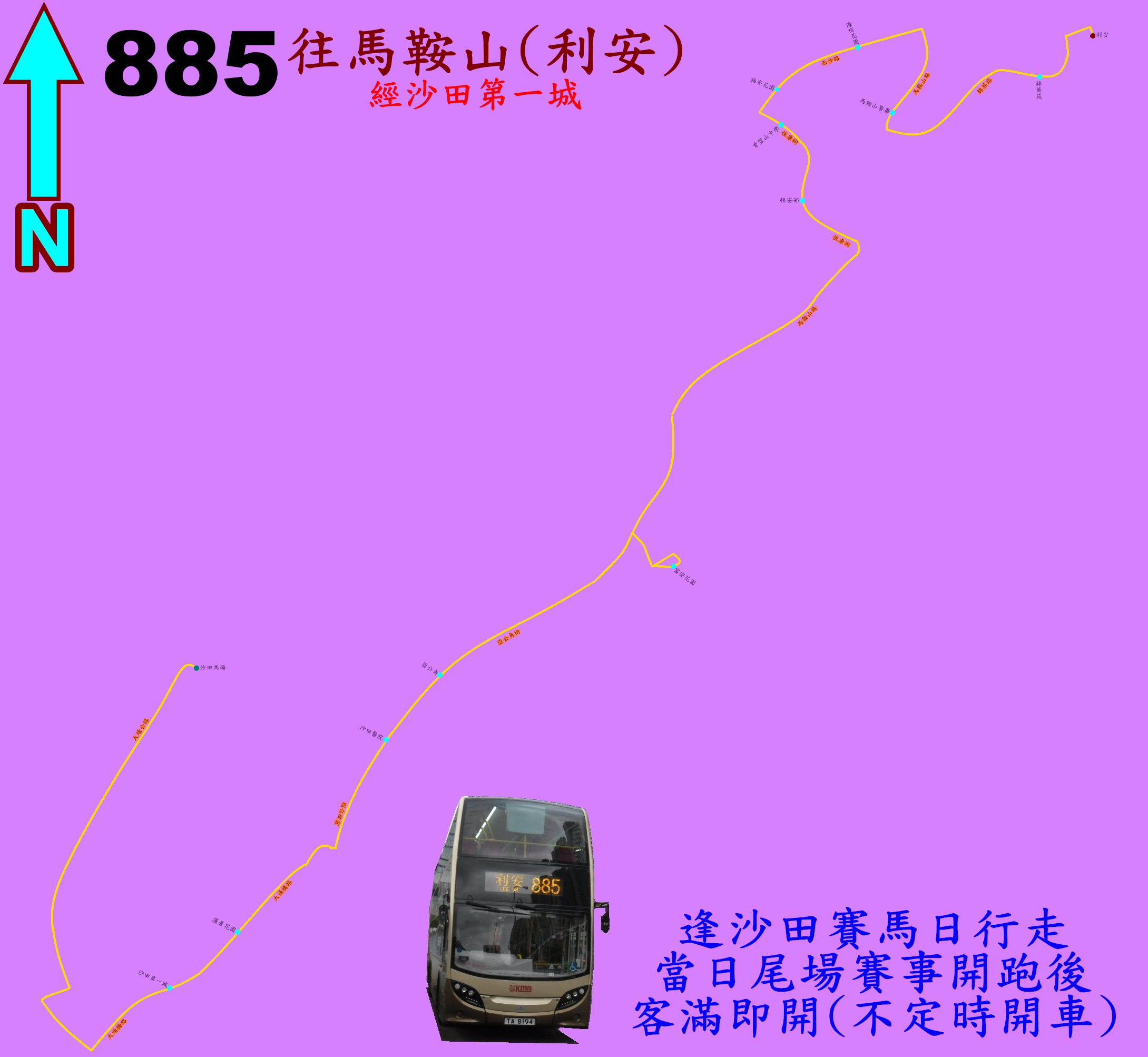 中文（香港）: 馬場巴士885線的走線圖